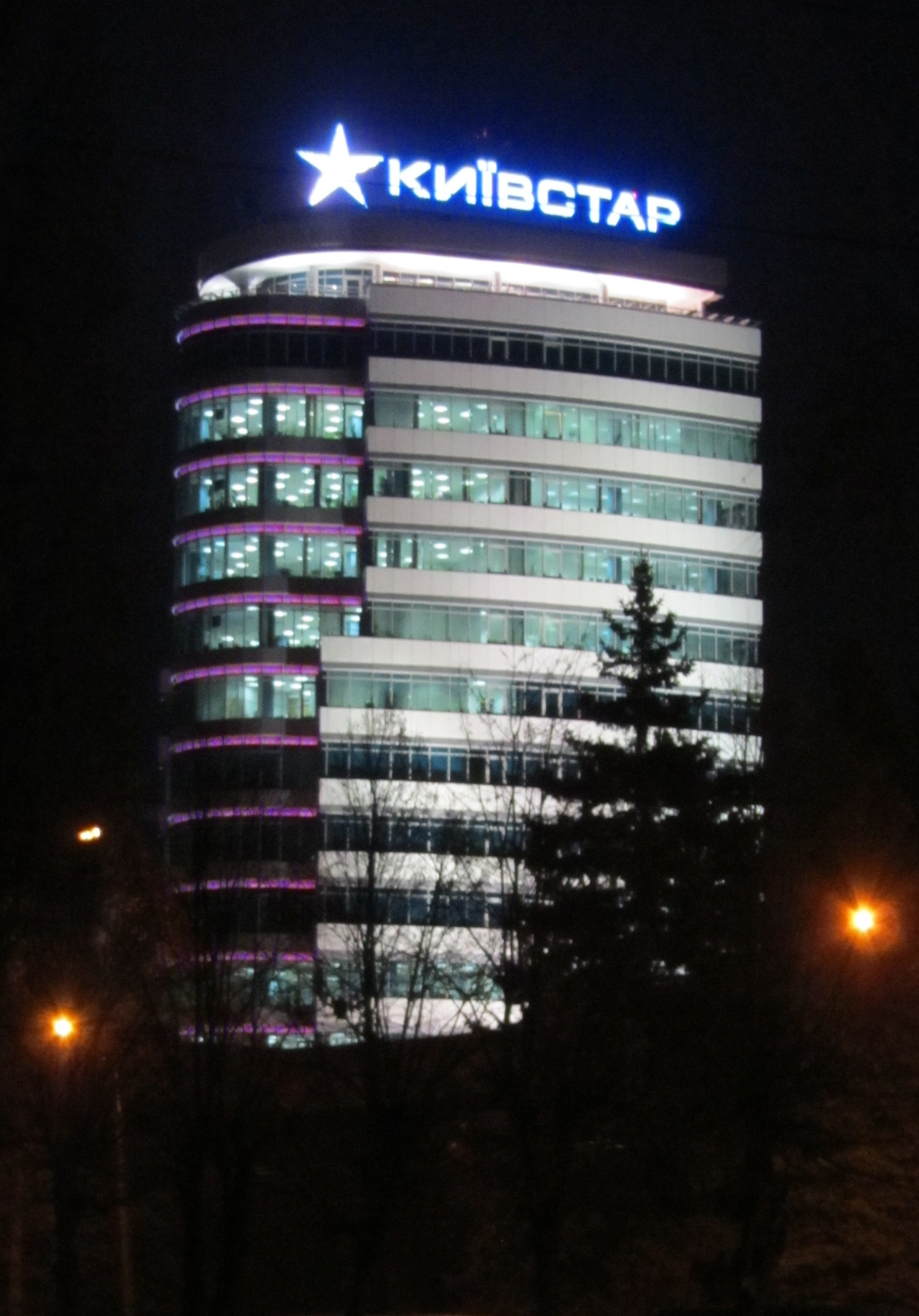 Головна будівля компанії Київстар у Дніпропетровську